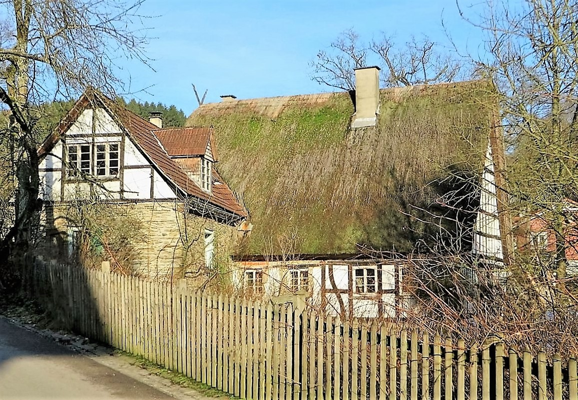 Denkmalgeschütztes Fachwerkhaus Zollweg im Attendorner Ortsteil Albringhausen, Alter Weg 8. This is a photograph of an architectural monument.It is on the list of cultural monuments of Attendorn